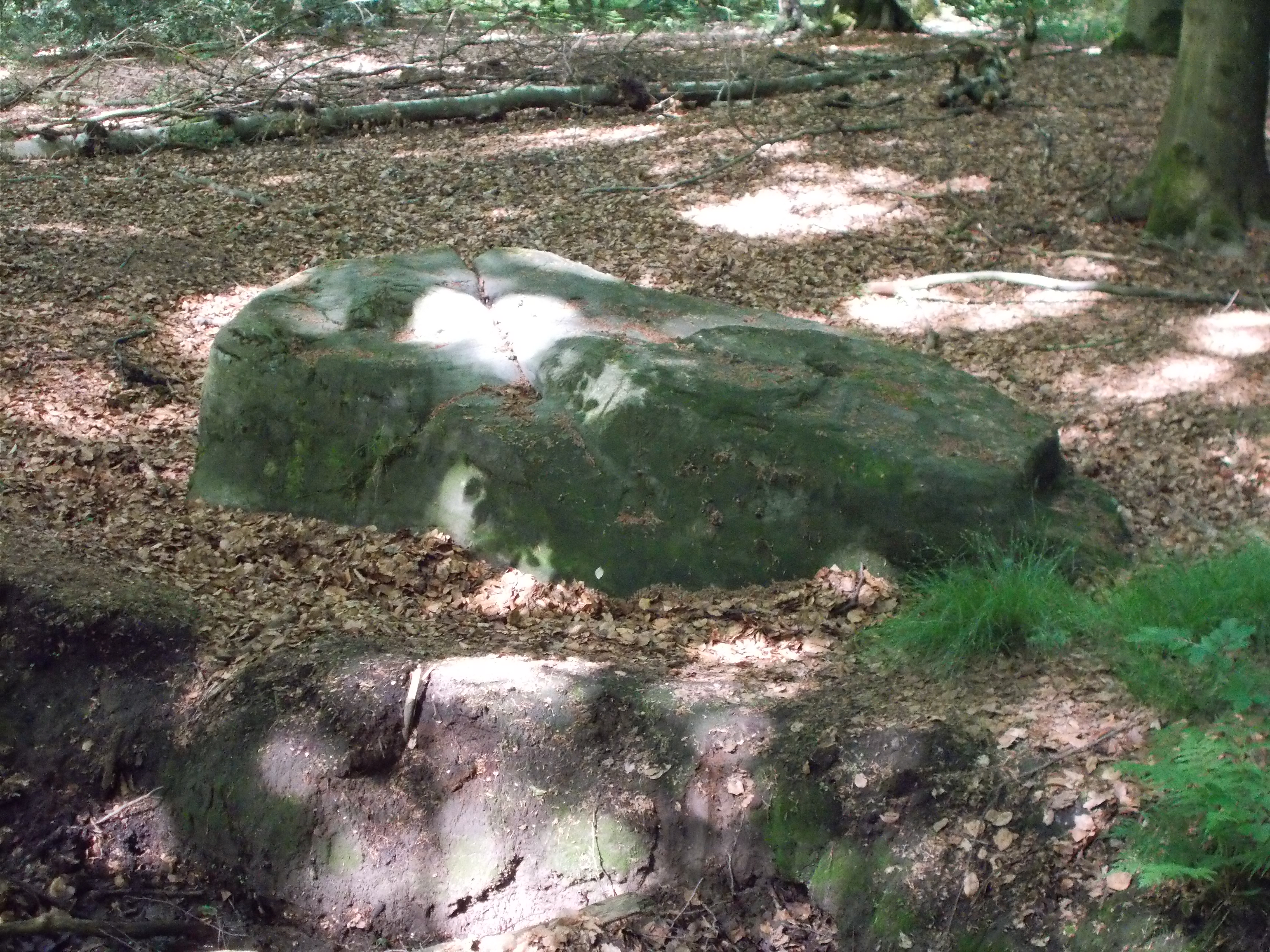 Naturdenkmal Teufelssteine am Teufelssteinweg im Hünxer Wald. ND 27. Großer Teufelsstein mit 15 Bohrlöchern auf der Oberseite. Maße: 410 x 350 x 50 cm.